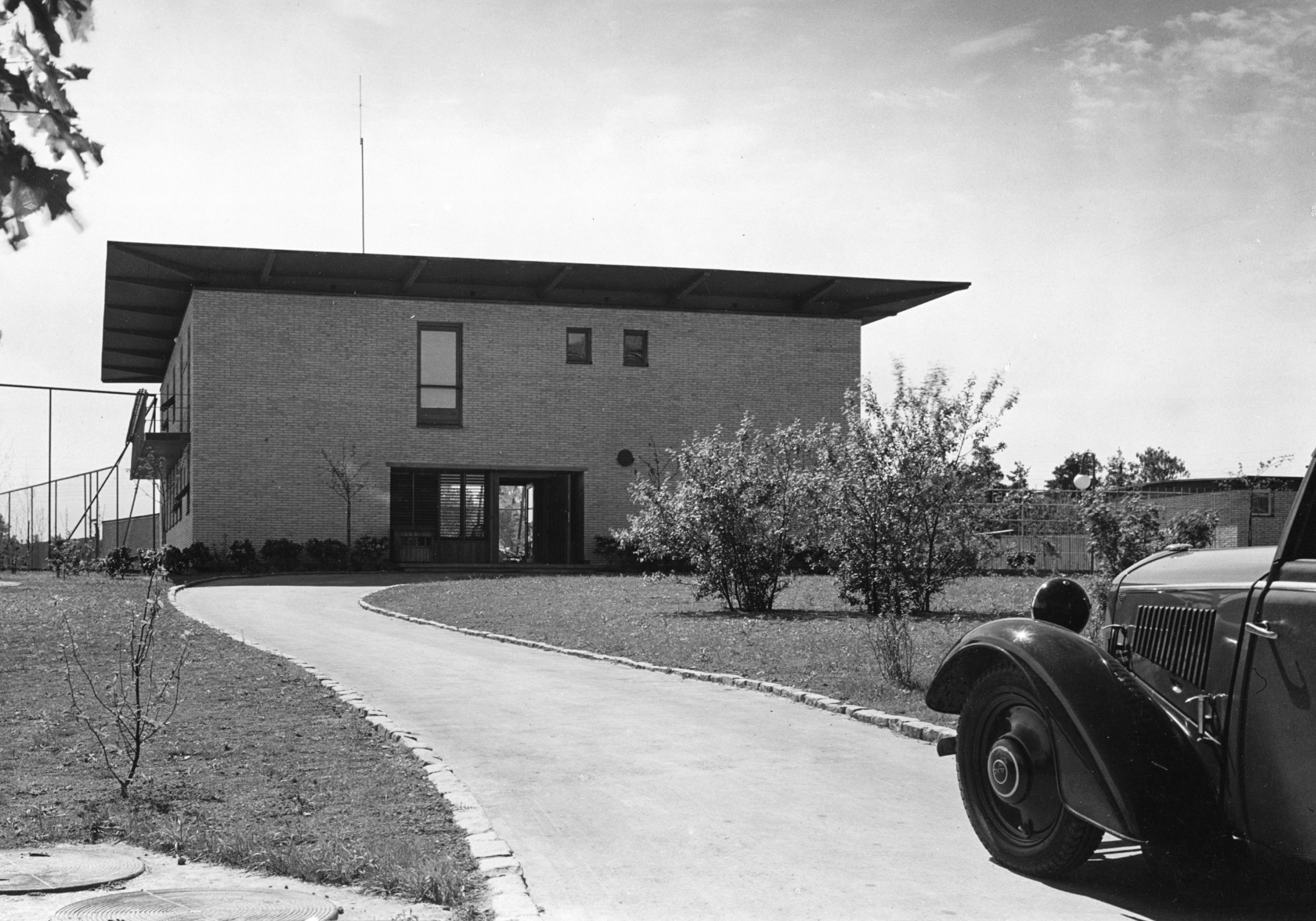 Villa Engkvist, fasad (arkitekt Backström & Reinius)